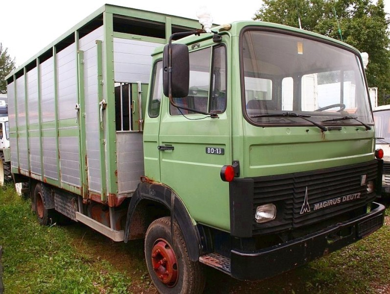 Magirus-Deutz Viehtransporter Typ M 130 M 8 FL